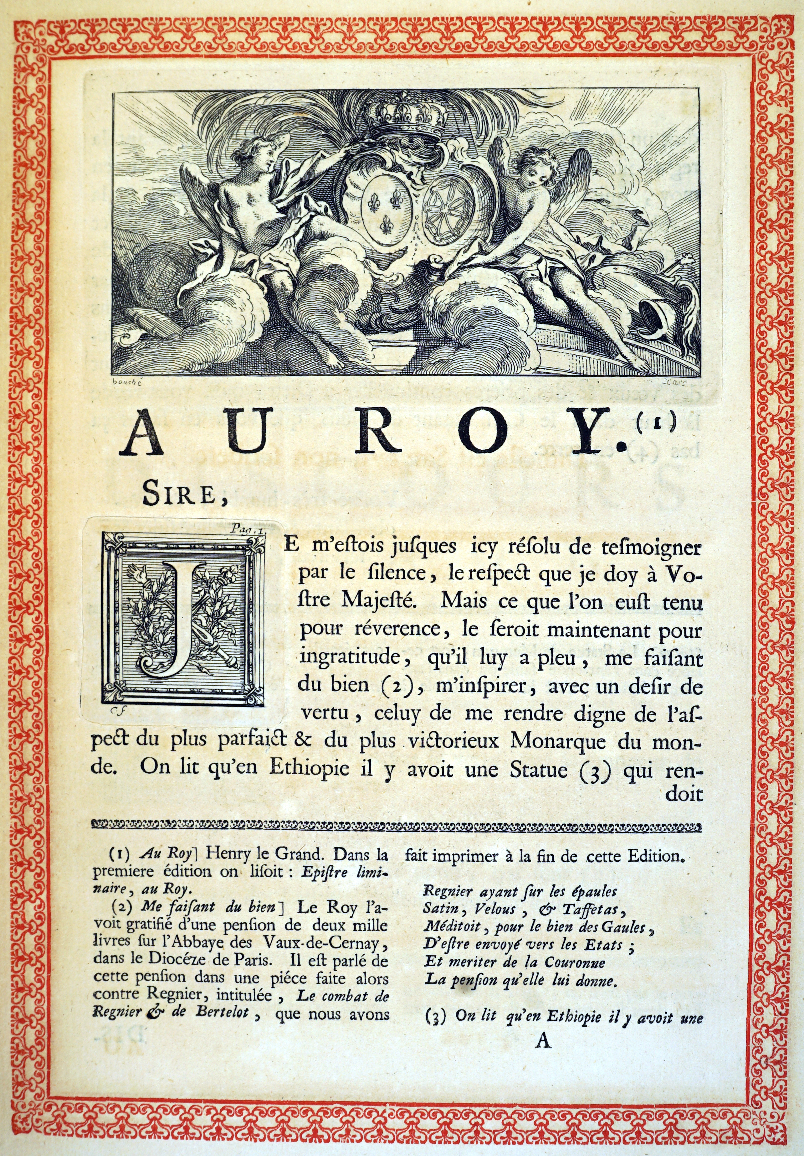 page du livre de Régnier.